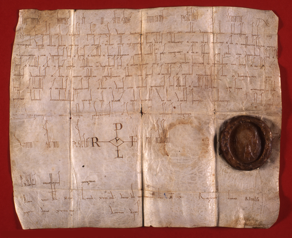 Acte de donation de 1011